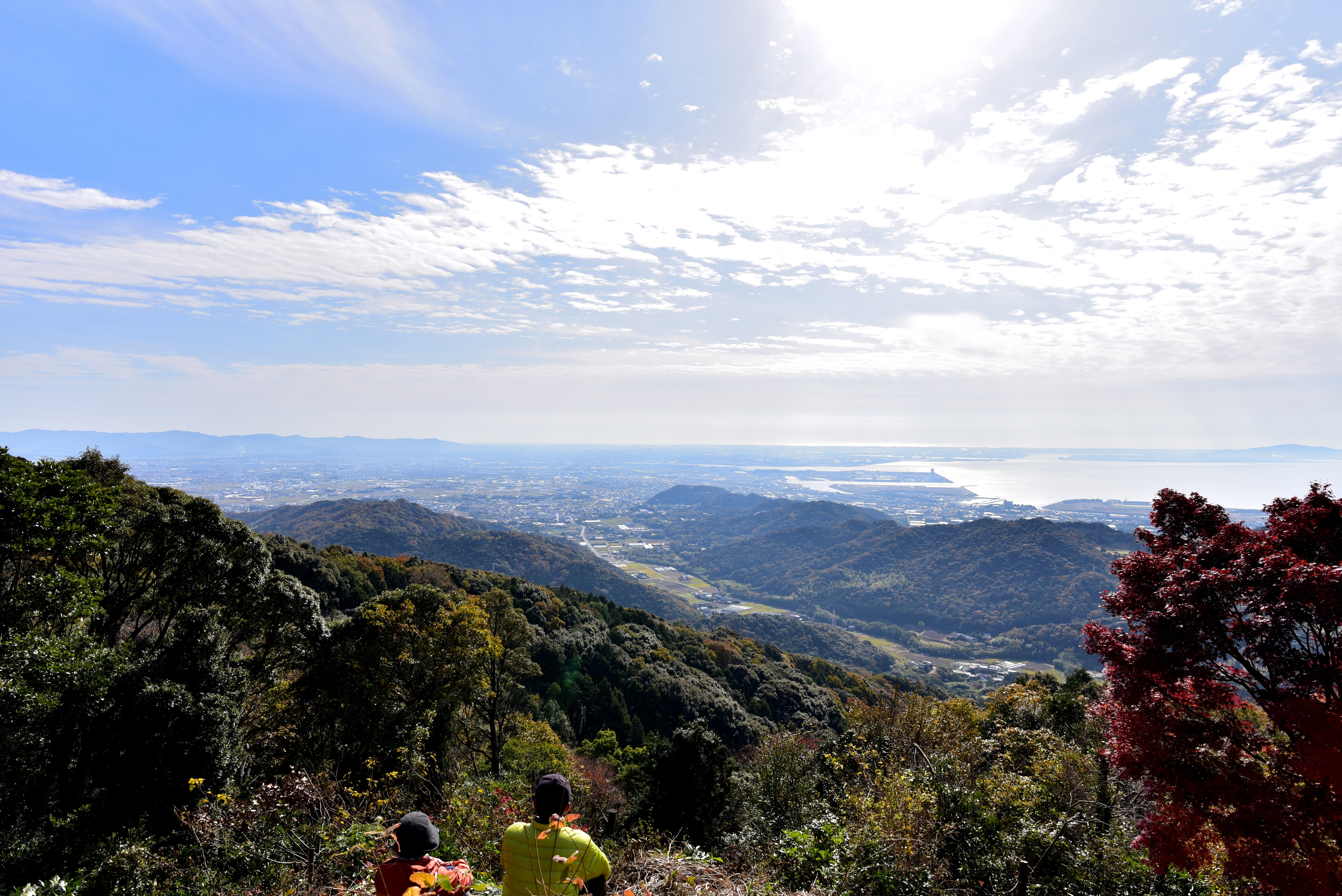 宮路山から三河湾方面を望む